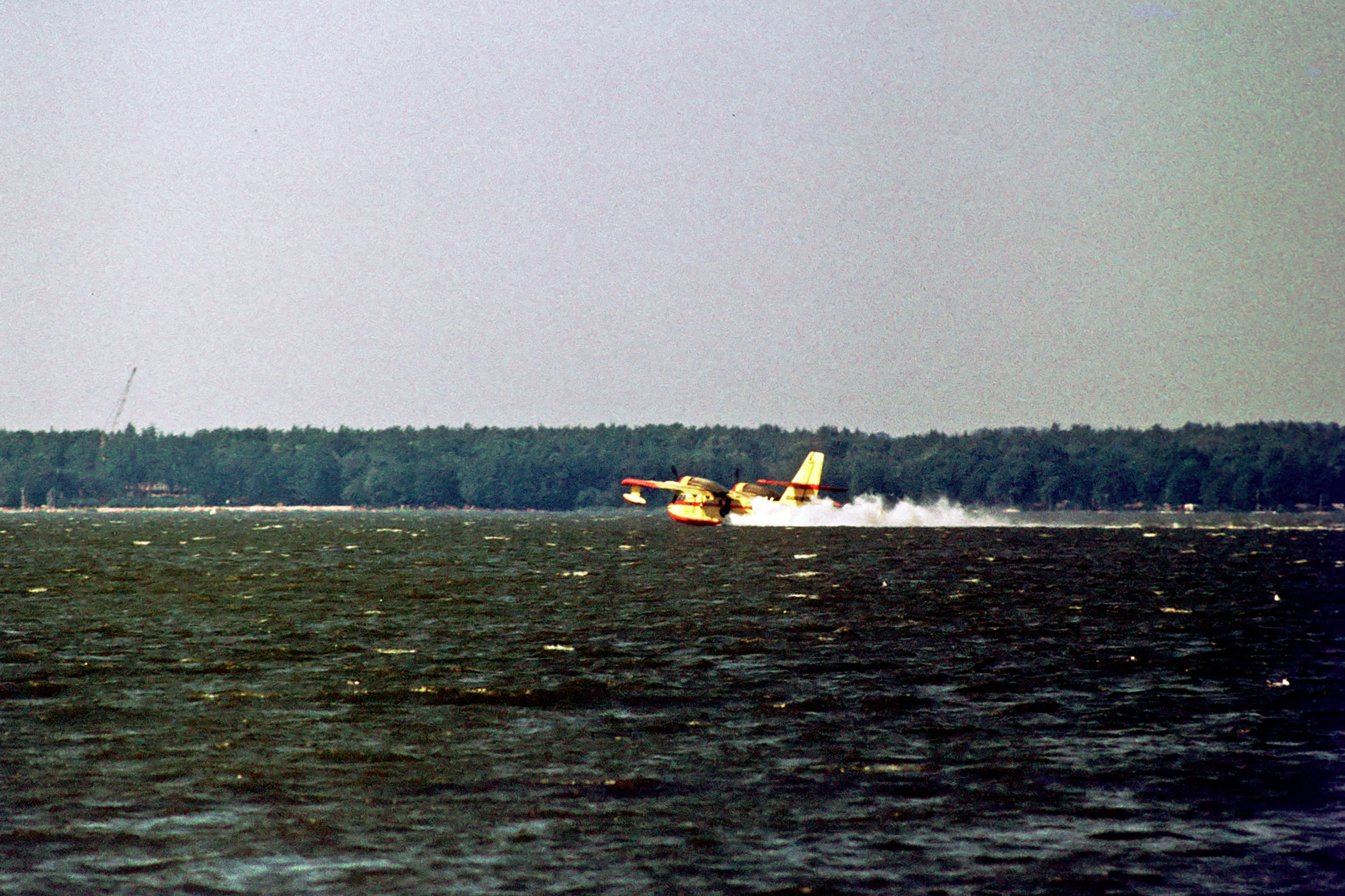 Löschflugzeug bei der Wasseraufnahme auf dem Steinhuder Meer 2